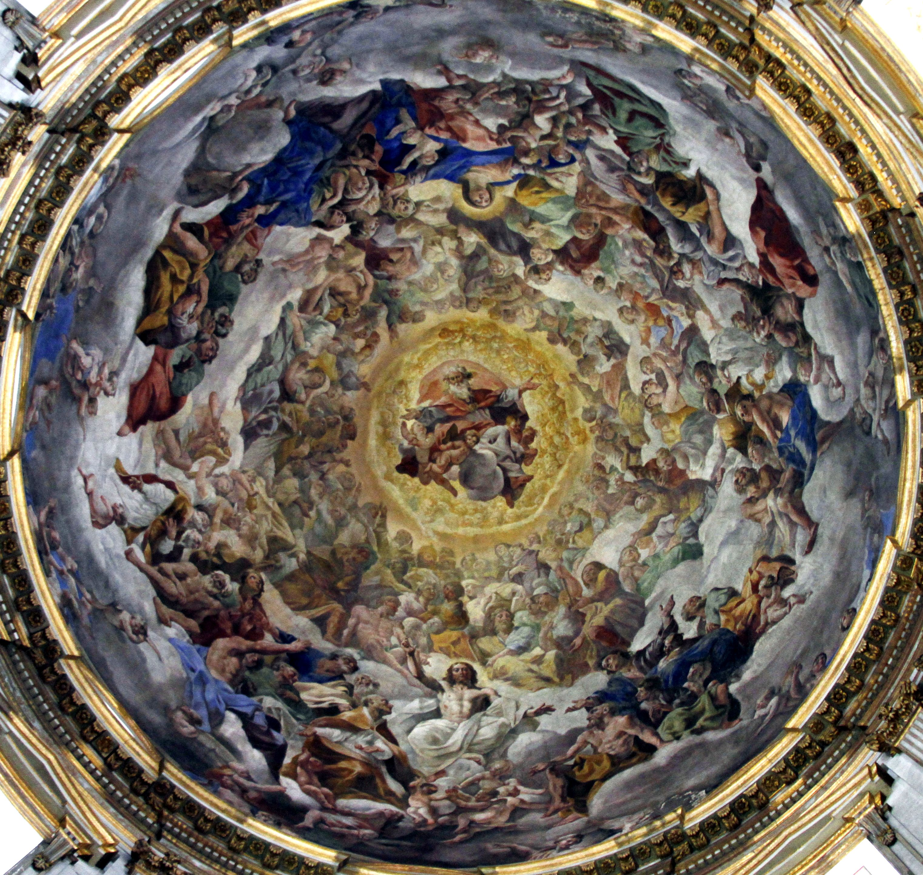 Cappella di San Gennaro, Catedral de Nápoles